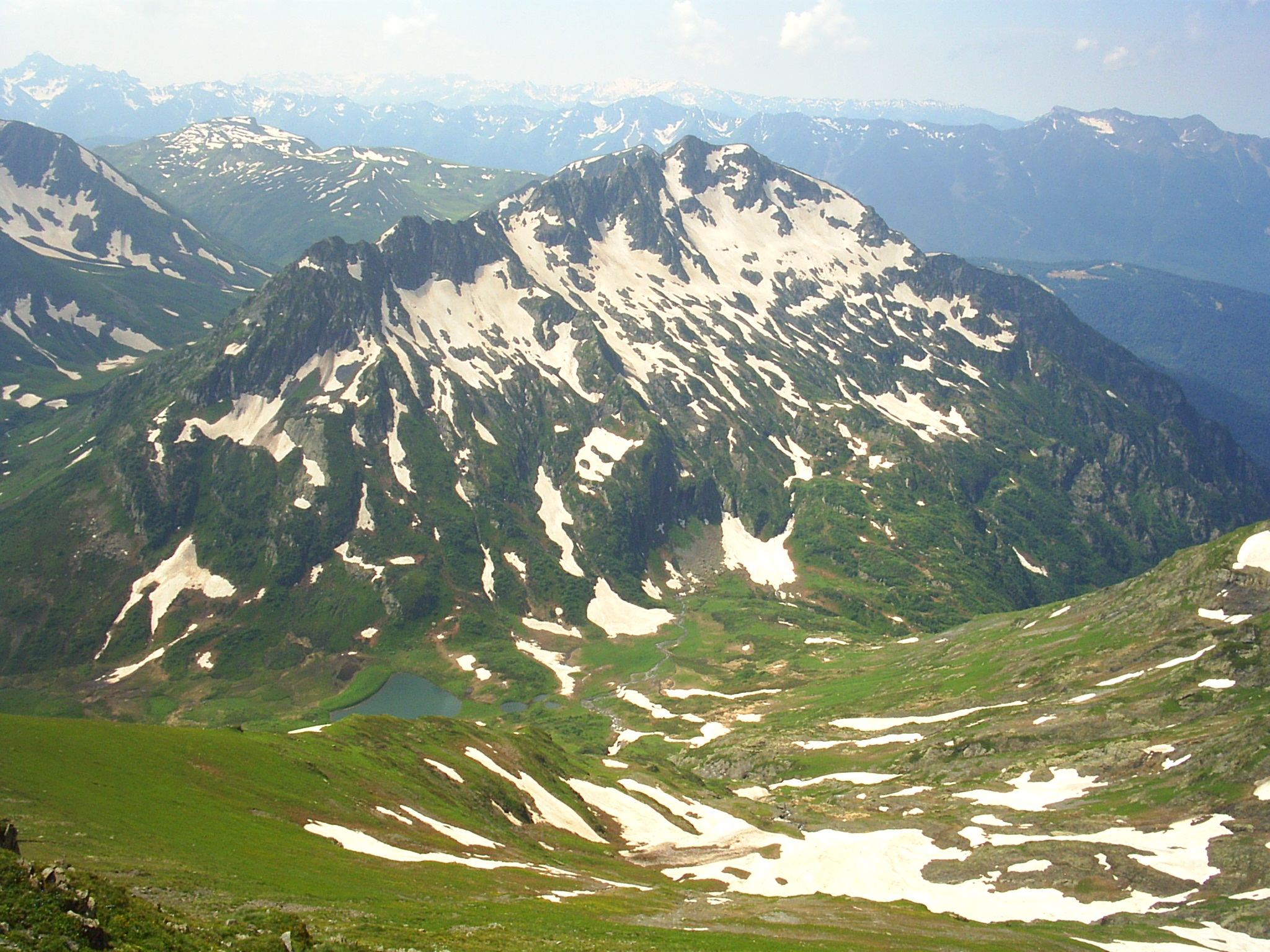 Долина Семиозерье. Кавказский государственный природный биосферный заповедник. This image is related to the protected area of Russia number 2300002